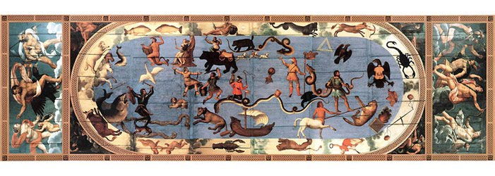 Deckenmalerei aus Schloss Ambras von Giovanni Battista Fontana